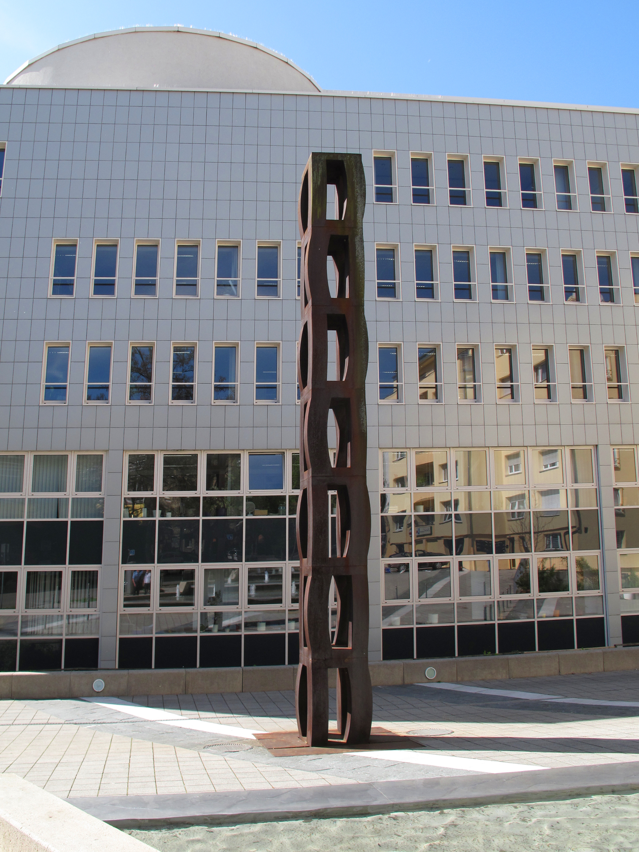 Peter Jacobi, Modulare Säule, 1990/92, - Deutschland, Baden-Württemberg, Pforzheim, Landratsamt, Zähringer Allee 3